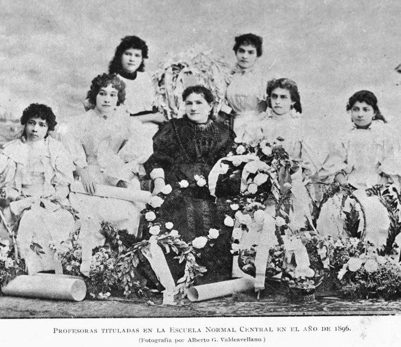 Profesoras graduadas de la Escuena Normal para Señoritas en 1896.